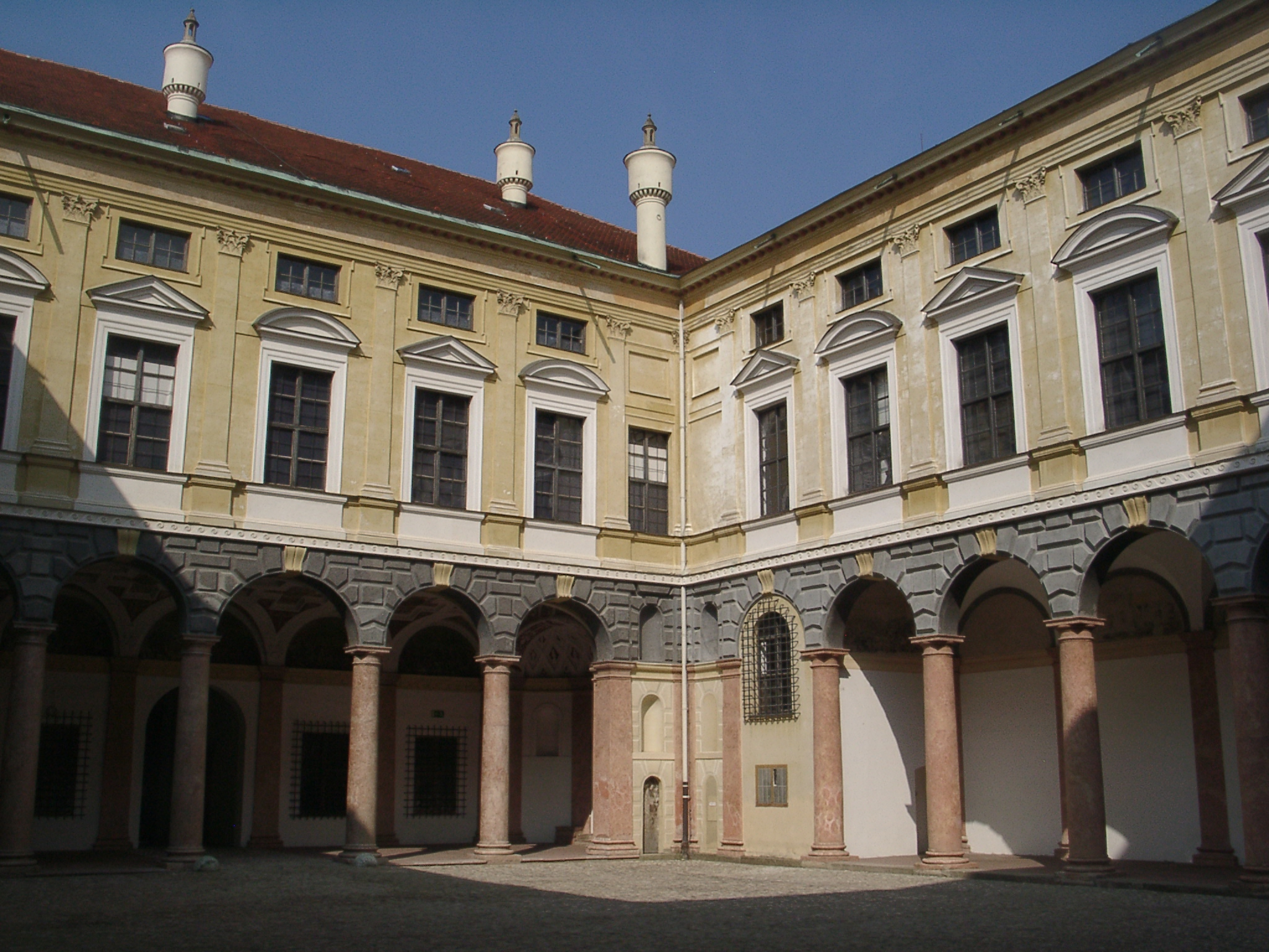 Landshut, Stadtresidenz